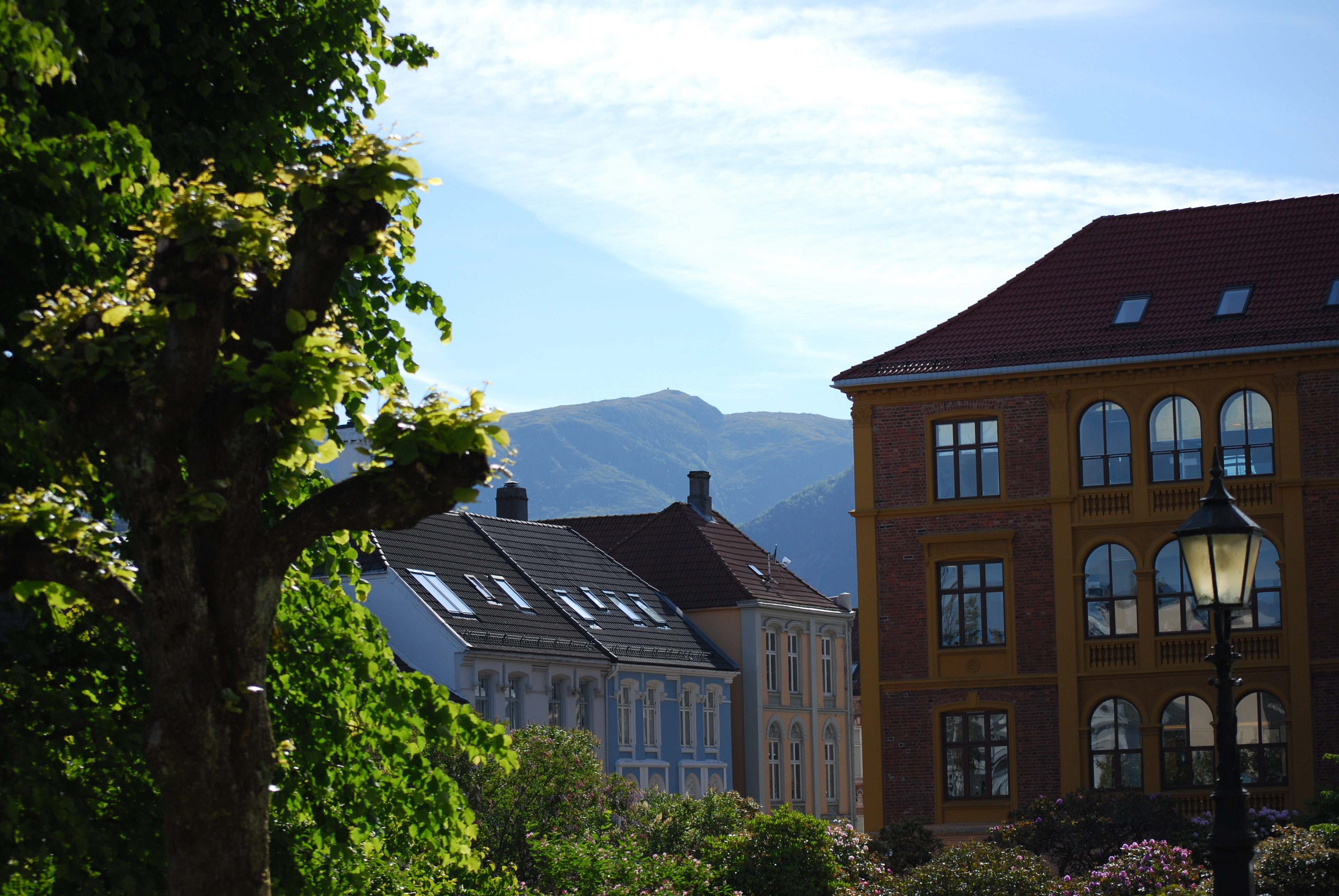 Description=Storfjellet (Bergen)